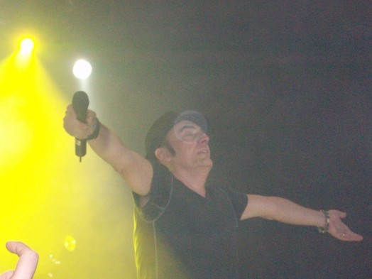 Mango in un concerto de "Gli Amori Son Finestre Tour" a Bari il 13 marzo 2010